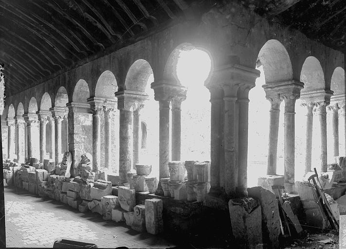 Hôpital Saint-Jean d'Angers, vue intérieure de la galerie sud du cloître (dépôt lapidaire) par Camille Enlart.